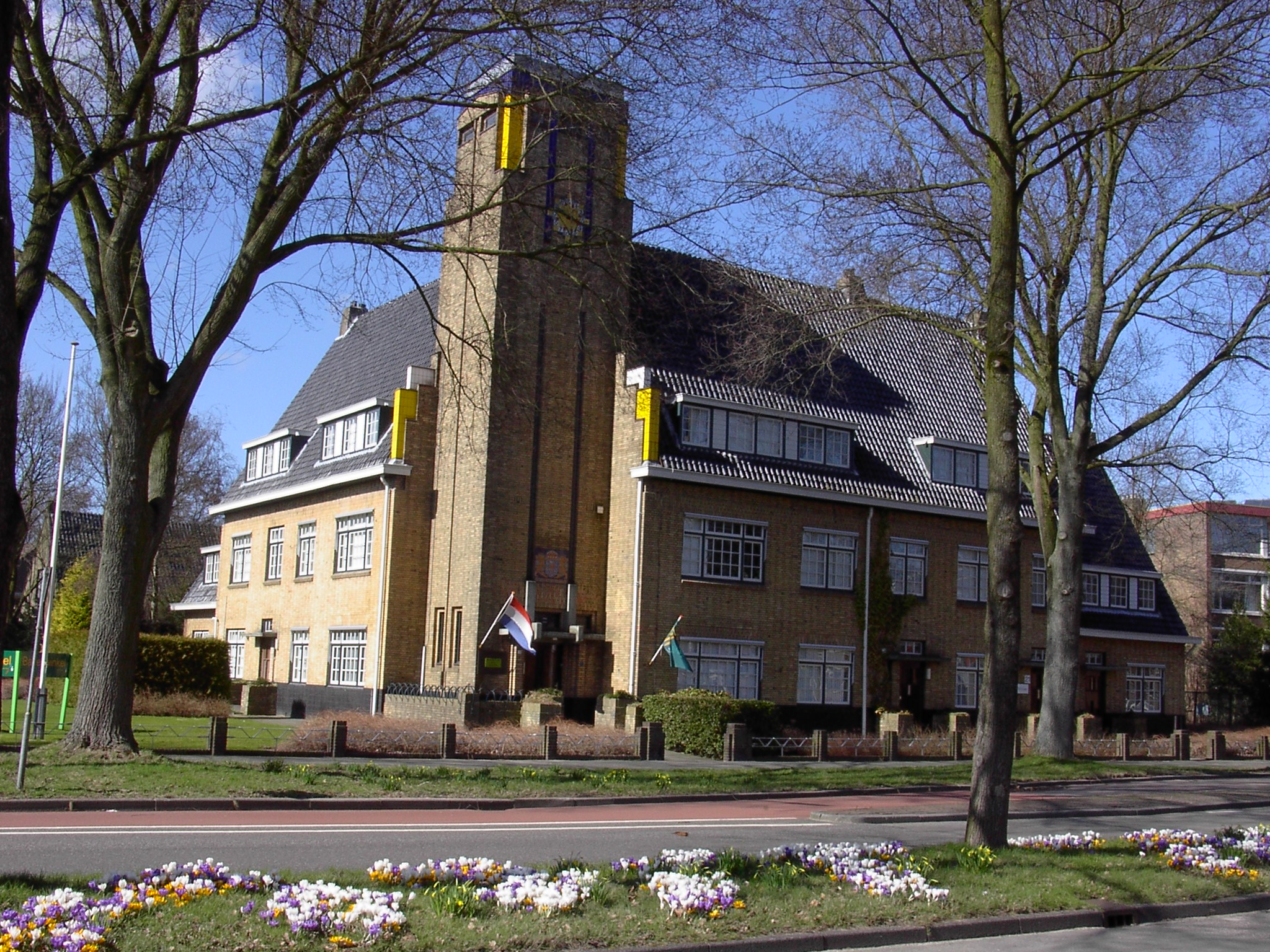 Marechaussekazerne Meppelerstraatweg